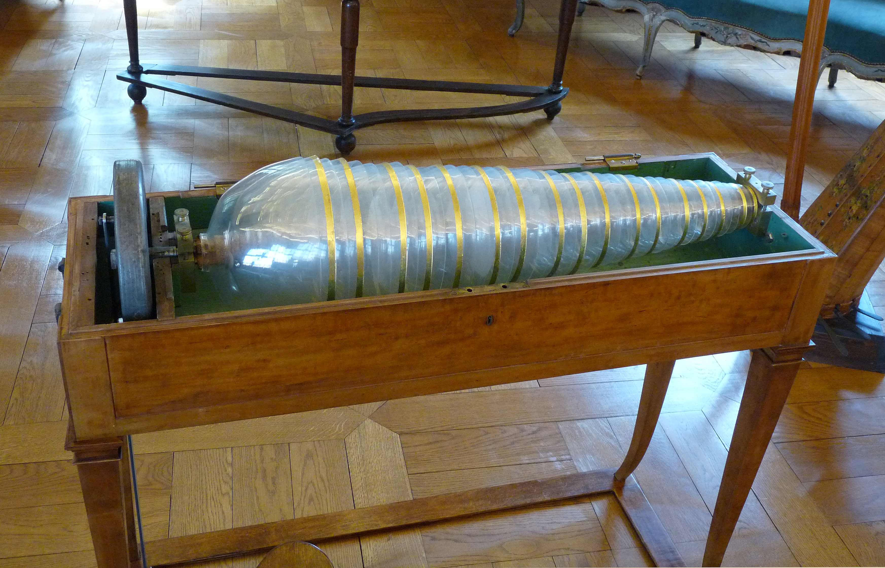 Musée Unterlinden (Colmar), salle des Demoiselles anglaises : armonica de verre, atelier Abresch de Karlsruhe, 1805, bâti en résineux, placage en citronnier, bois, verre, laiton, métal et dorure. Le pédalier et sa base ont été rajoutés lors de la restauration de l'instrument en 2006.